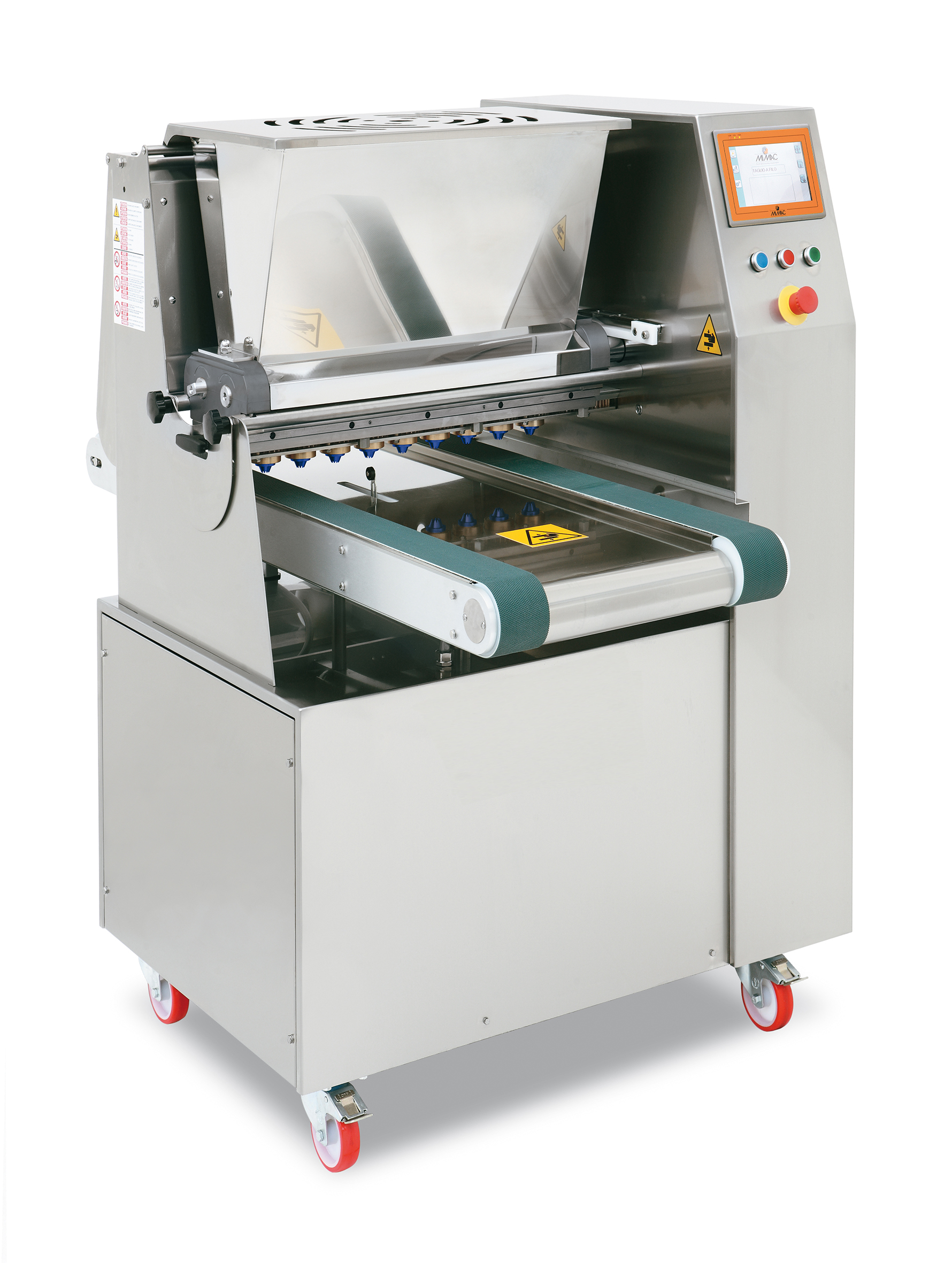 Colatrice adatta a produzioni intensive di biscotteria colata fissa, con stampo girevole e taglio a filo.